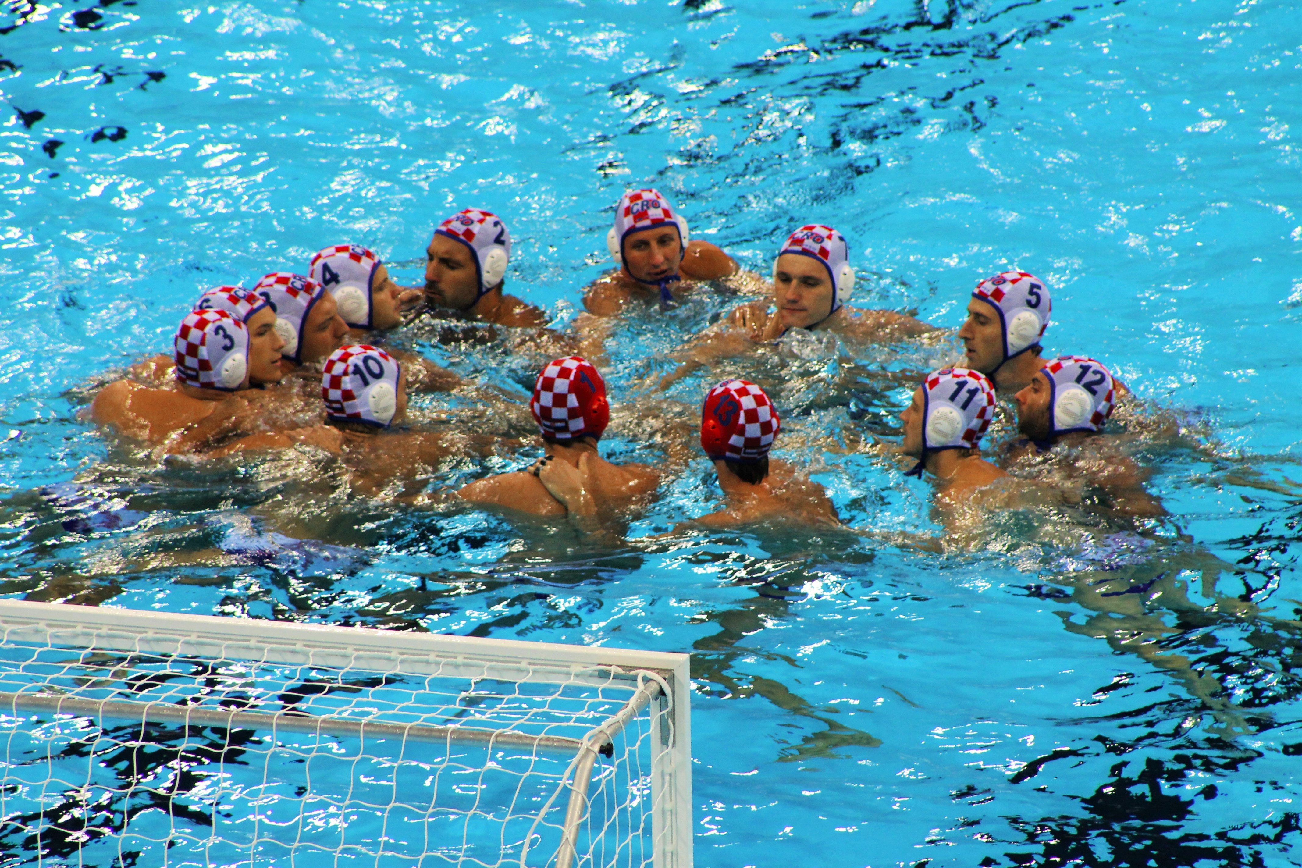 Equipe croata minutos antes do inicio da disputa pelo ouro Olímpico